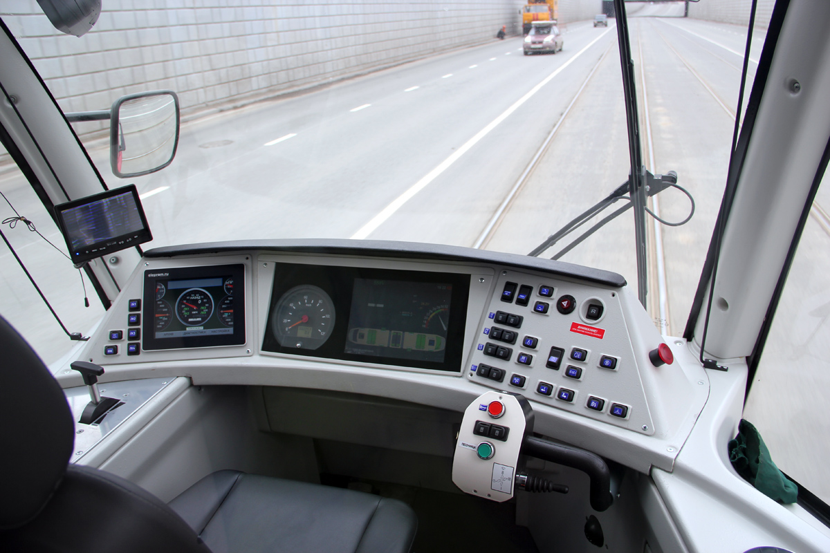 Кабина управления трамвая АКСМ-843